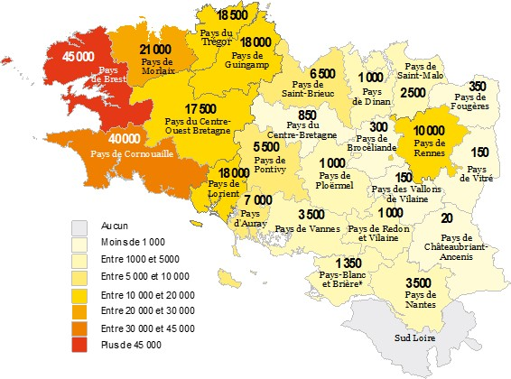 Nombre de locuteurs par pays dans l'ensemble de la Bretagne. Source : sondage TMO-Régions pour le Conseil régional de Bretagne – 2018 et OPLB pour le nombre d'élèves bilingues